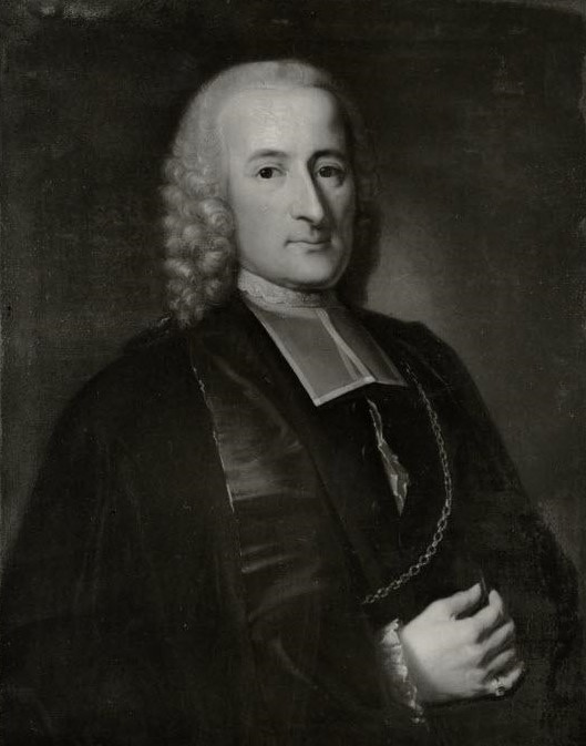 Abraham Benoit (1703–1775), Mitglied des Grossen Rats, Landvogt zu Interlaken, Landvogt zu Brandis.